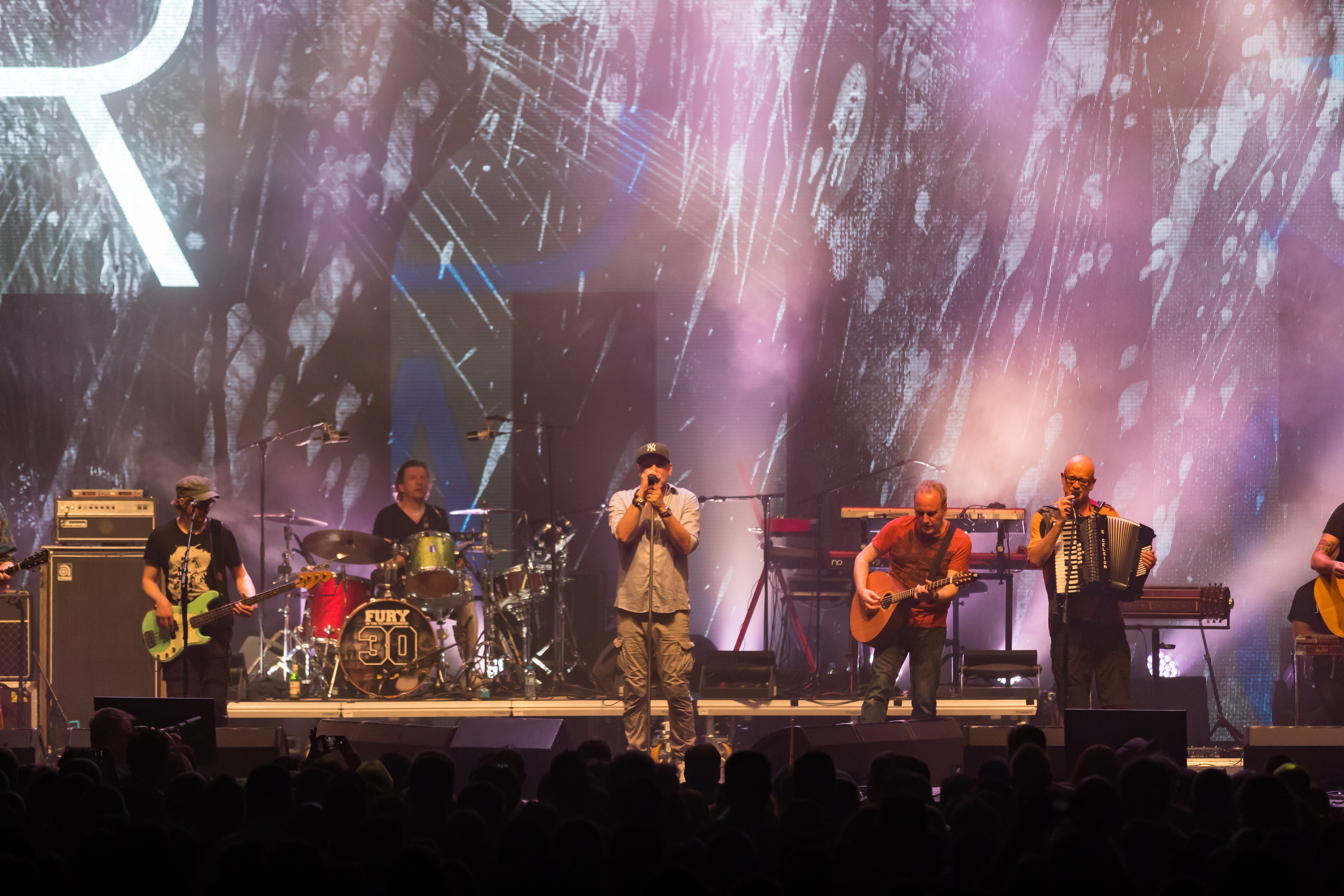 Fury in the Slaughterhouse during Zeltfestival Rhein-Neckar at Maimarkt, Mannheim, Baden-Württemberg, Germany on 2017-06-14, Photo: Sven Mandel